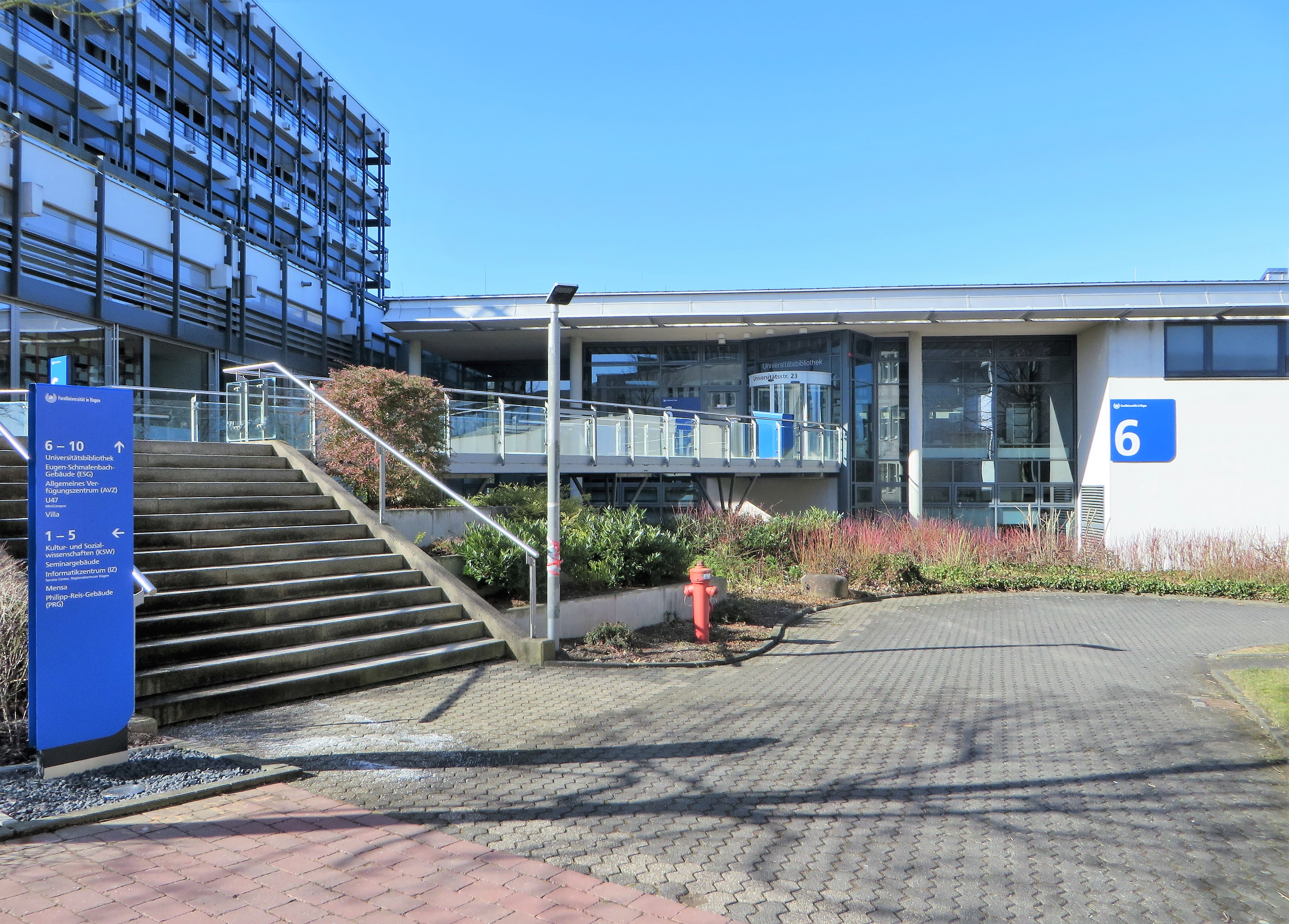 FernUniversität Hagen. Blick auf den Eingangsbereich der Universitätsbibliothek.